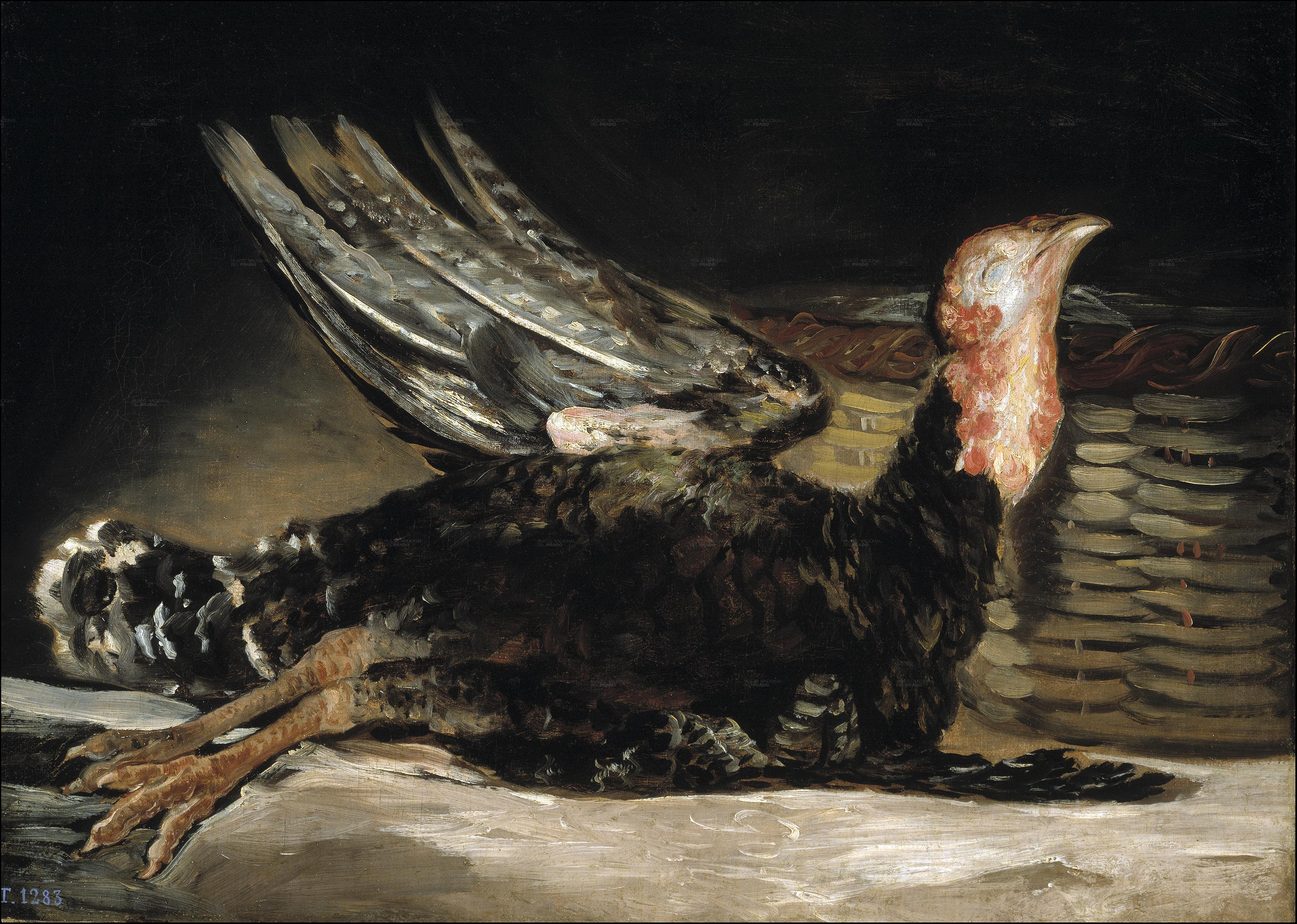 Pavo muerto. Óleo sobre lienzo, × cm. Madrid, Museo del Prado.